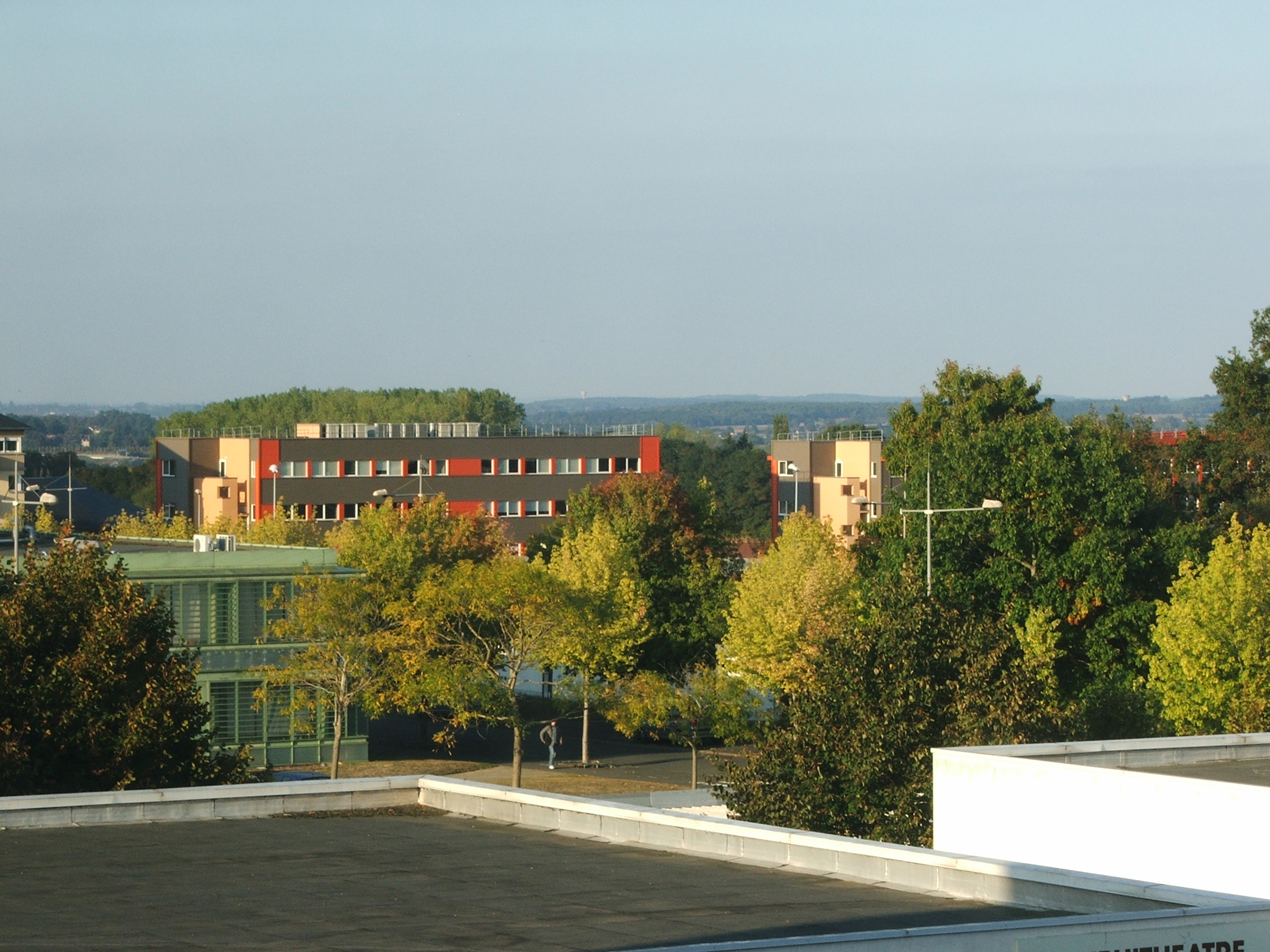 Le campus du Ribay au Mans depuis le bâtiment Enseignements Lettres, dernier étage.